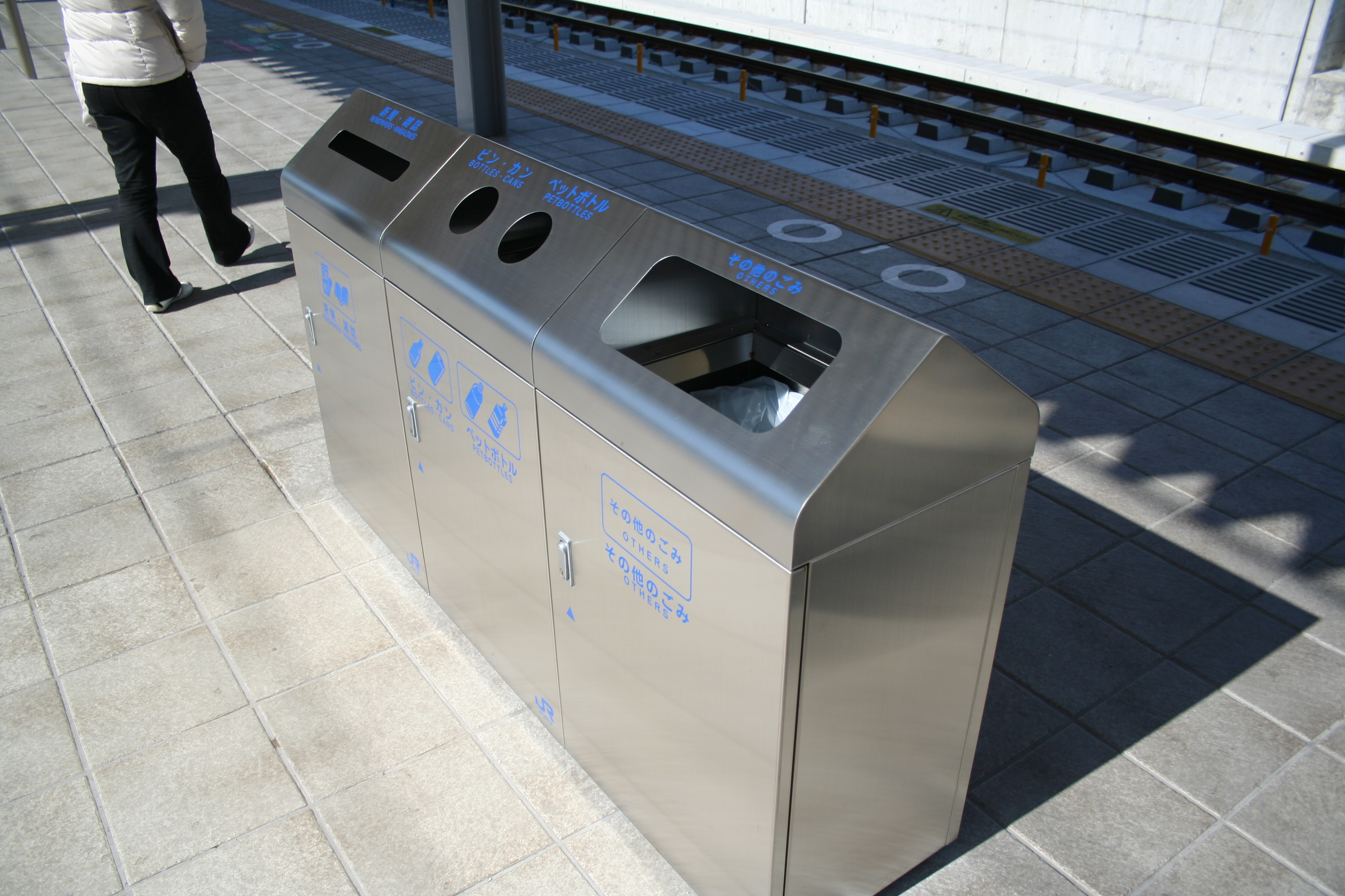 ３・４番線にあるゴミ箱。